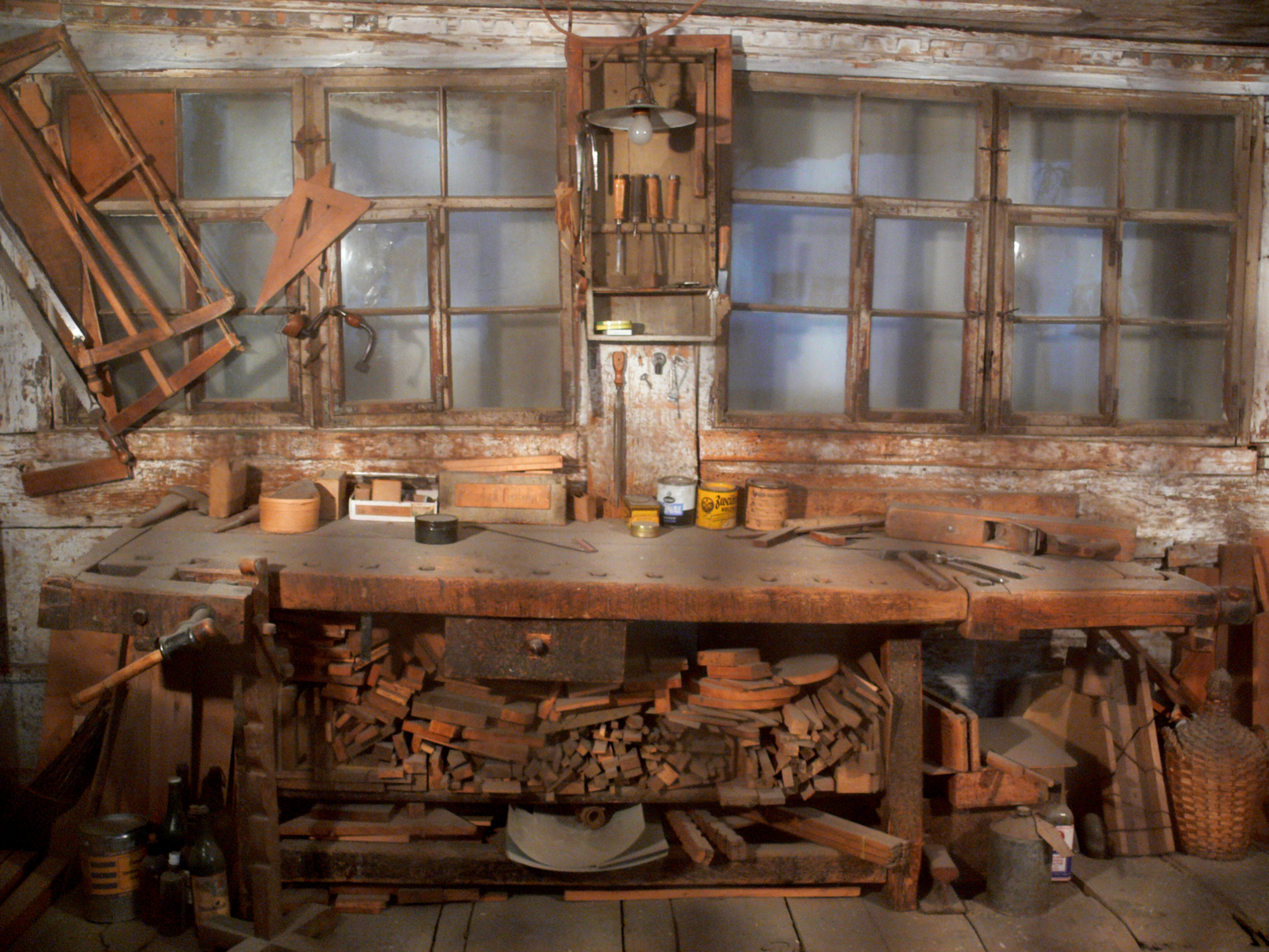 Werkstatt der 1794–1969 bestehenden Schreinerei Boos, Aulendorf. Wand- und Deckenverkleidung wohl aus der Zeit um 1794, Werkzeug und Ausstattung wurden von vier Generationen von Schreinermeistern der Familie Boos angesammelt. Noch in den 1960er Jahren wurde diese Werkstatt, die völlig ohne elektrische Maschinen auskommt, vom letzten Schreiner aus der Familie verwendet. Landesmuseum Württemberg (Außenstelle Museum für Volkskultur in Württemberg, Waldenbuch) 2.5., Inv. Nr. VK 1987/615